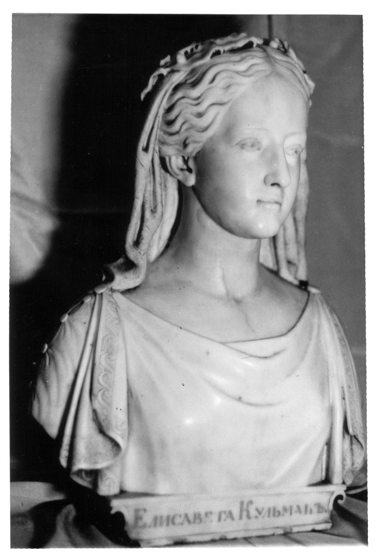 Фотография мраморного бюста Елисаветы Кульман работы скульптора Паоло Катоцци